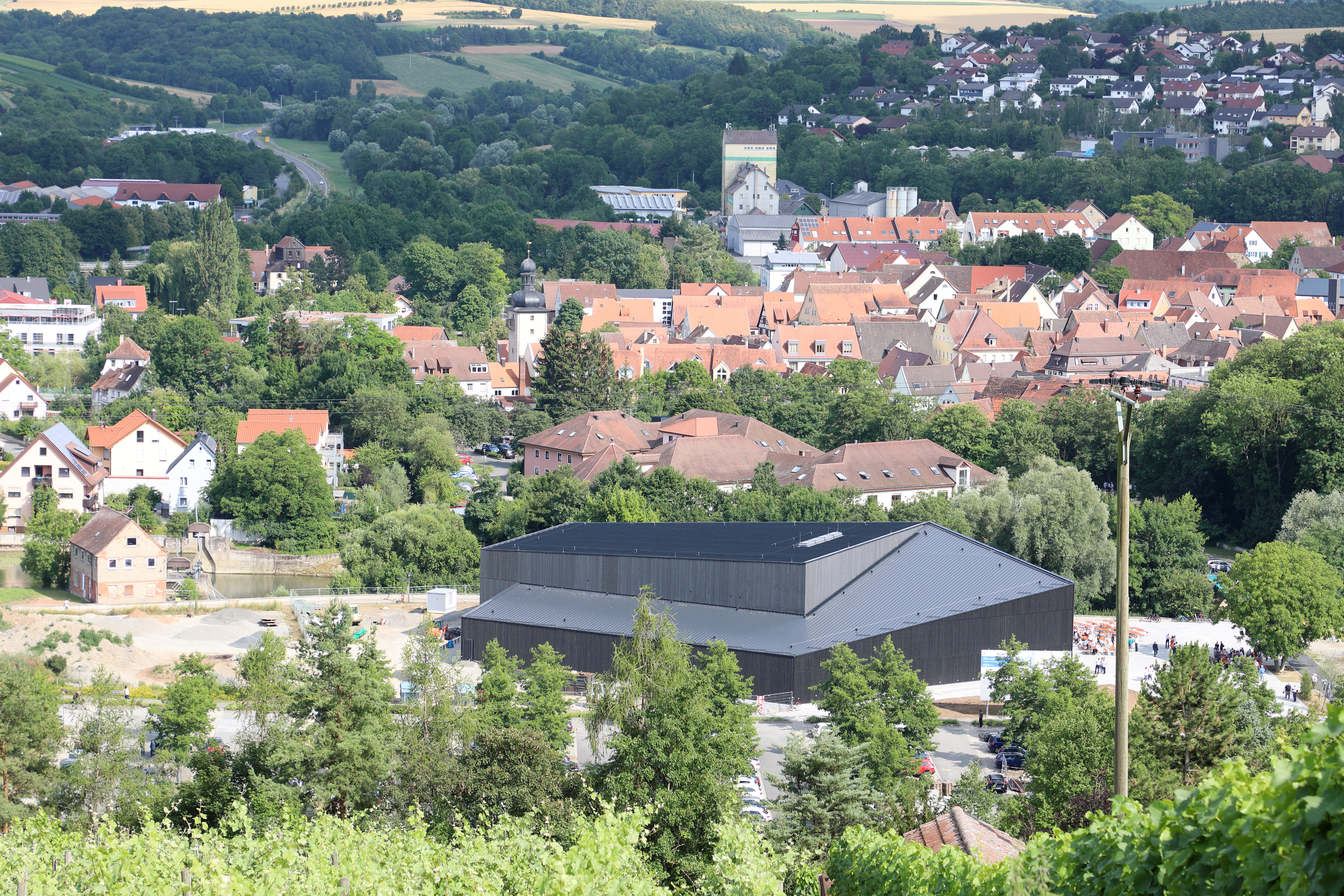 Die Tauberphilharmonie Weikersheim am Tag der Eröffnung im Juli 2019.